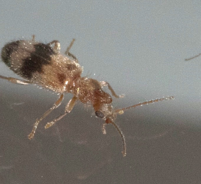 Notoxus calcaratus, Subfamily: Monoceros Beetles, ID Confidence: 88